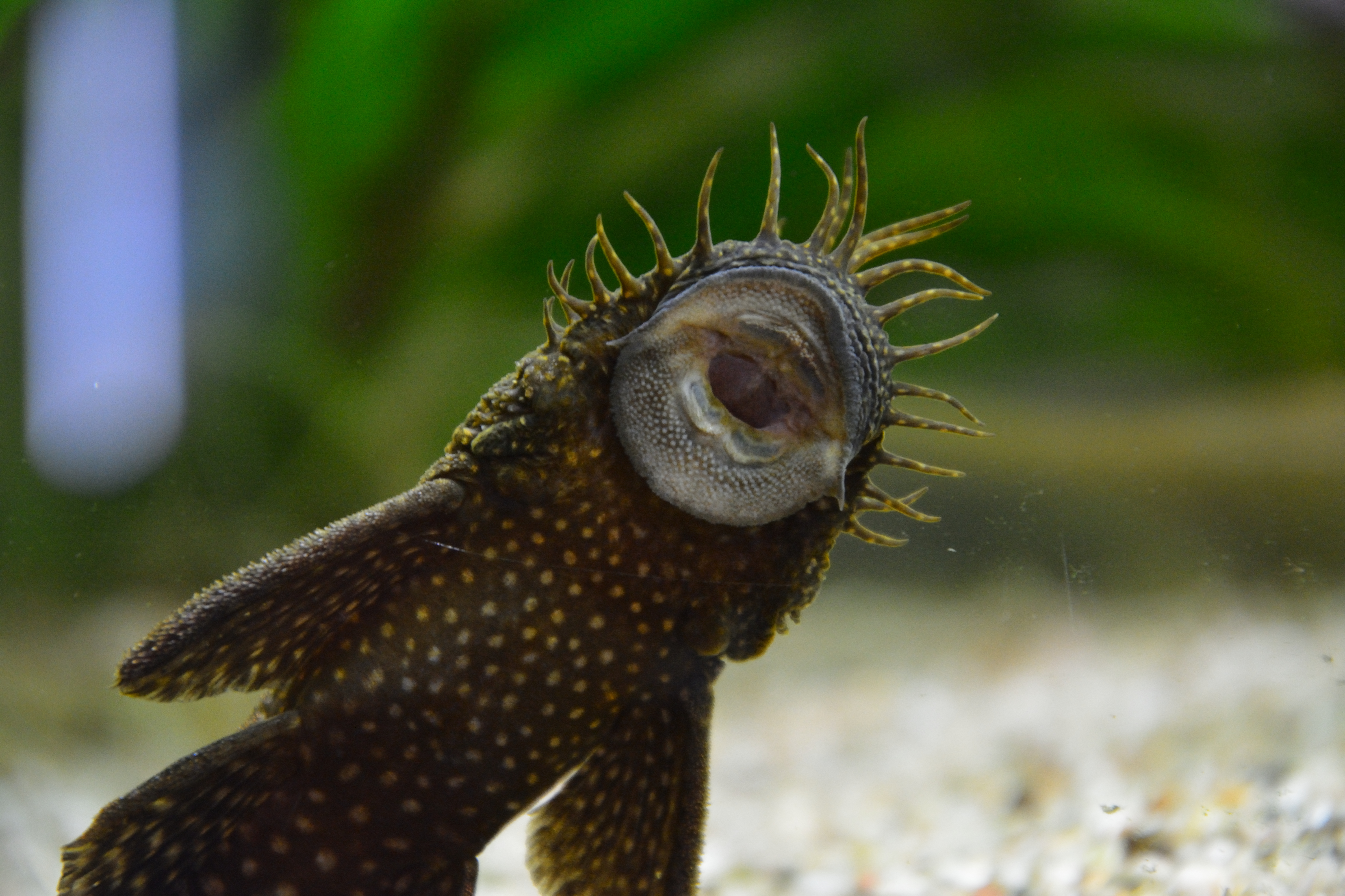 Erinnerung an die WikiCon 2019 in Wuppertal..